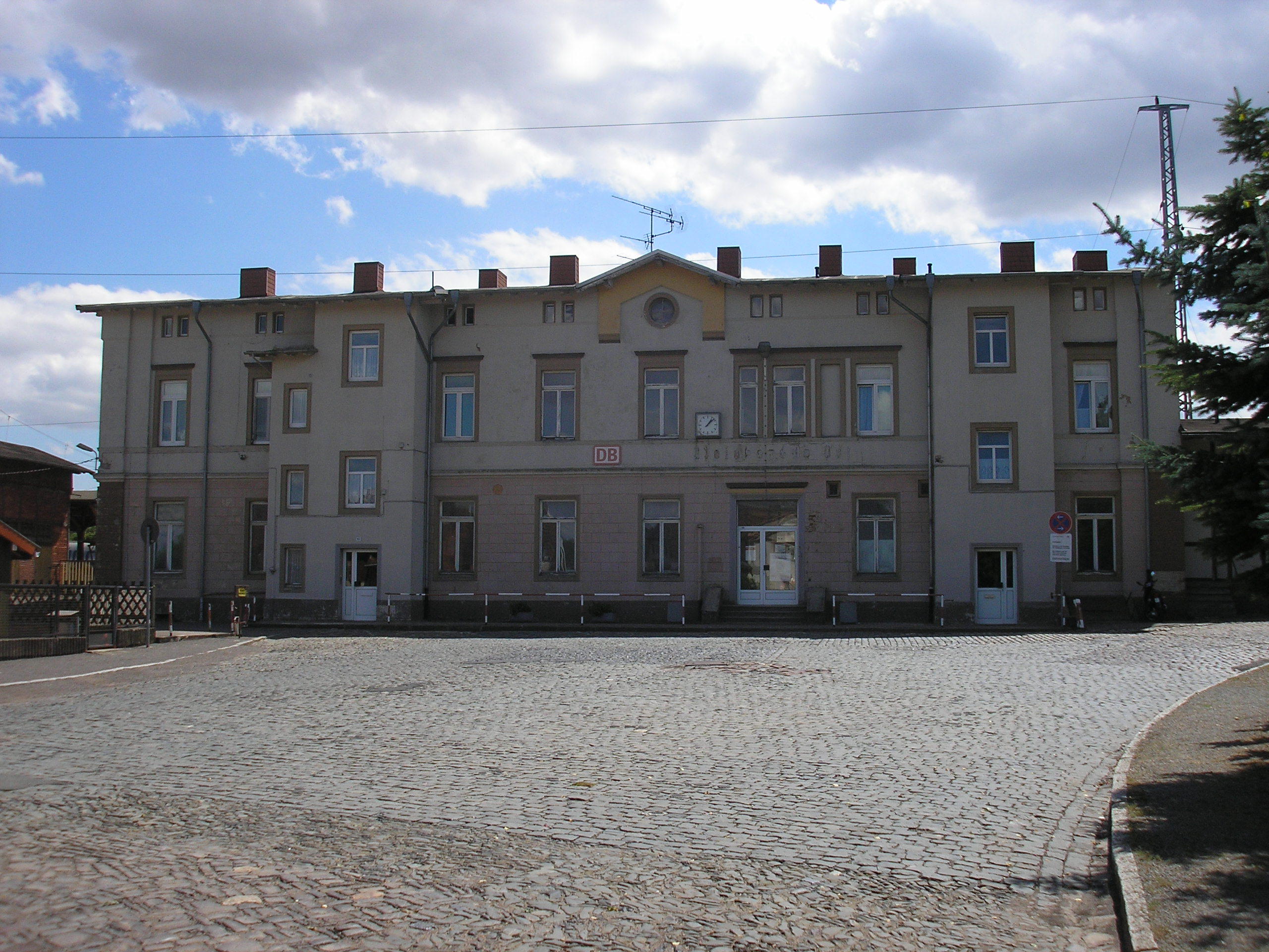 Der Bahnhof Bleicherode Ost in Bleicherode (Thüringen).